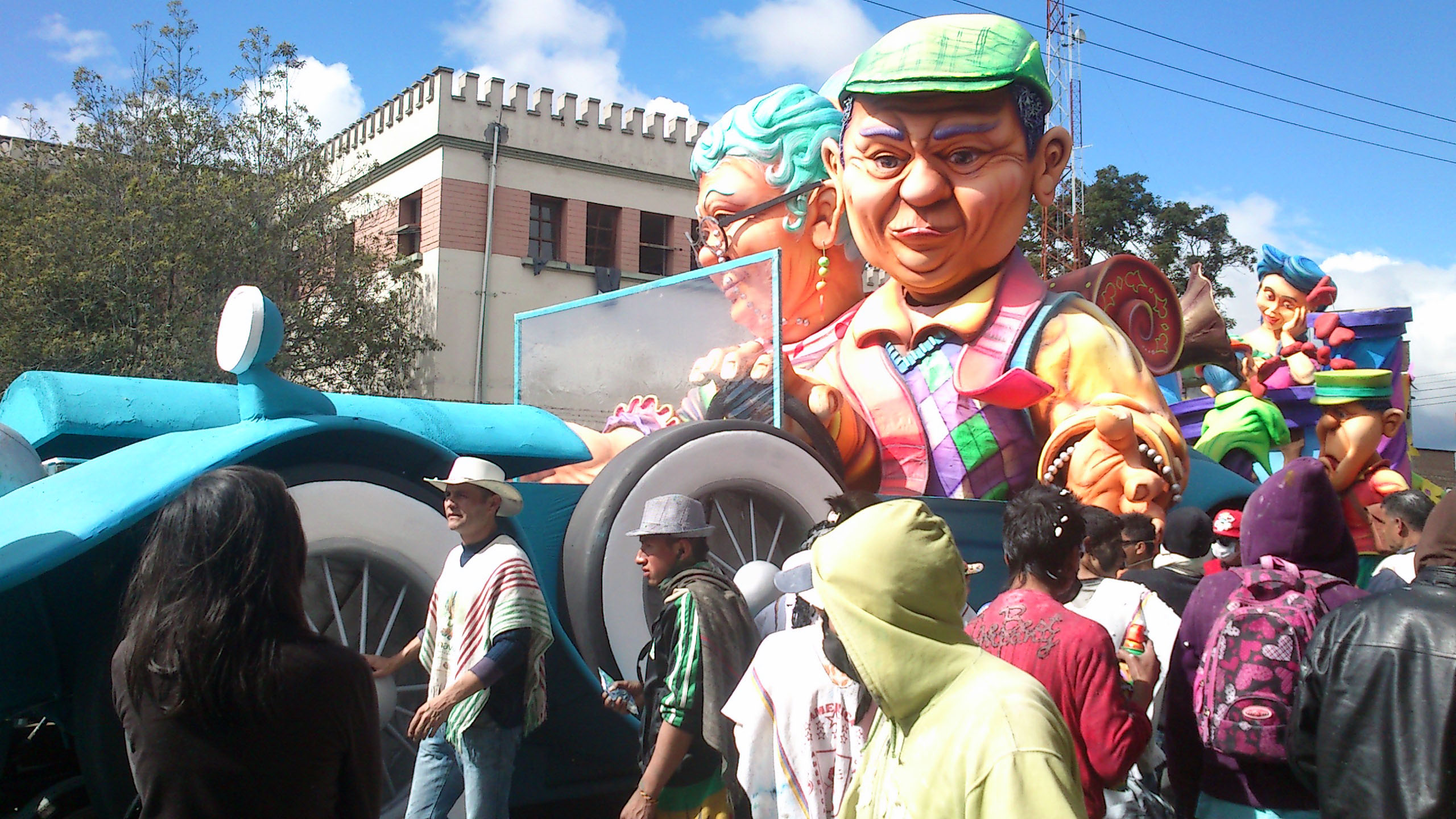 hermosa carroza en el carnaval multicolor de la frontera en ipiales